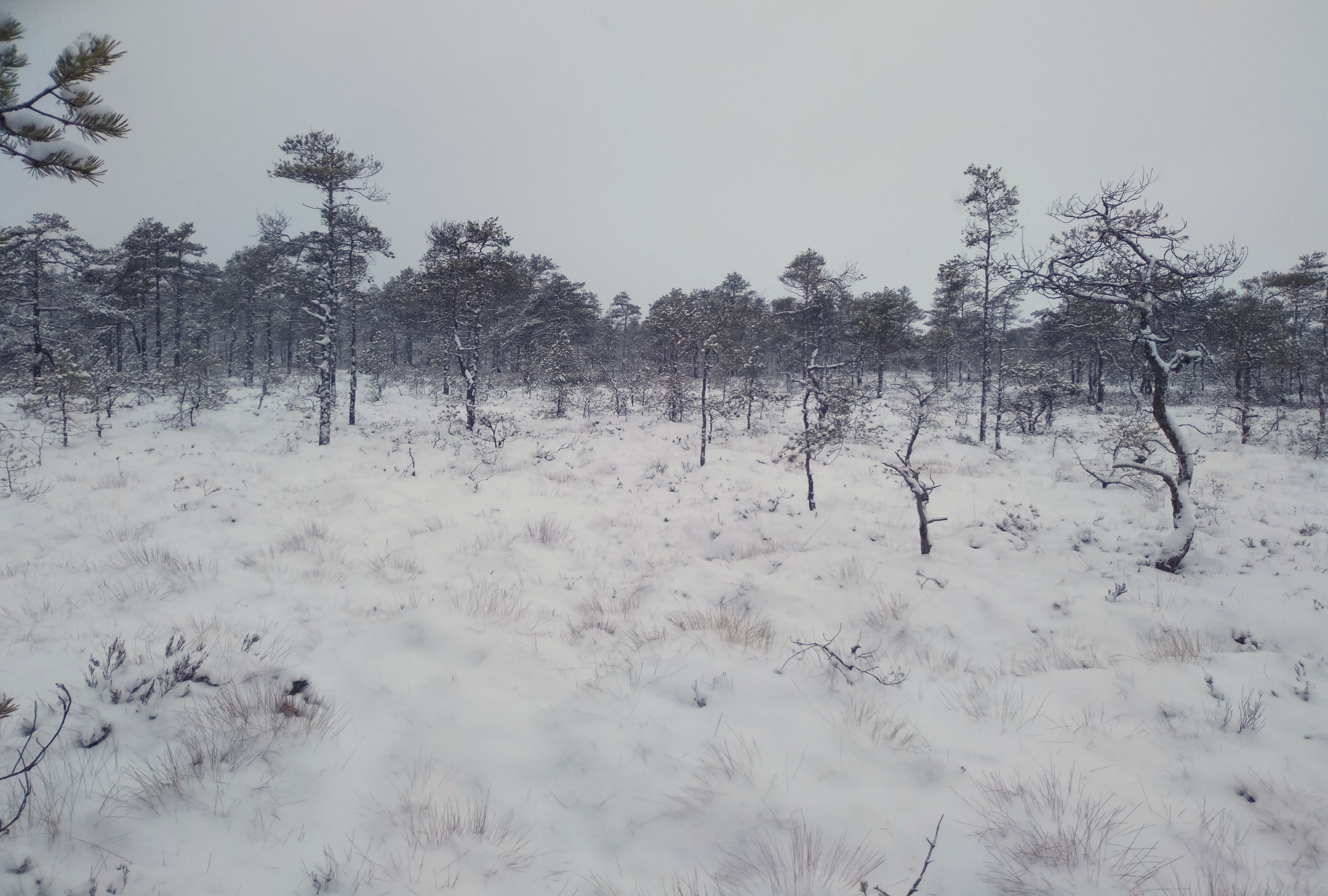 Rabivere raba on raba Raplamaal Kohila vallas ja alevis. Soo jääb Rabivere maastikukaitseala piiresse.